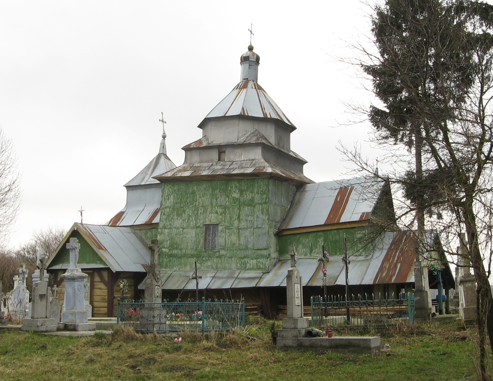 Церква Св. Дмитрія (мур.), Орихівчик, 1775 р.